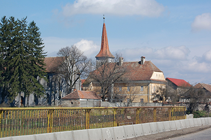 Schirkanyen in Siebenbürgen.